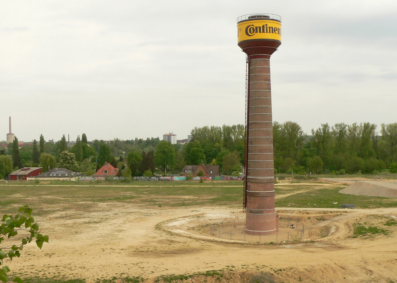 Wasserturm in der Wasserstadt Limmer